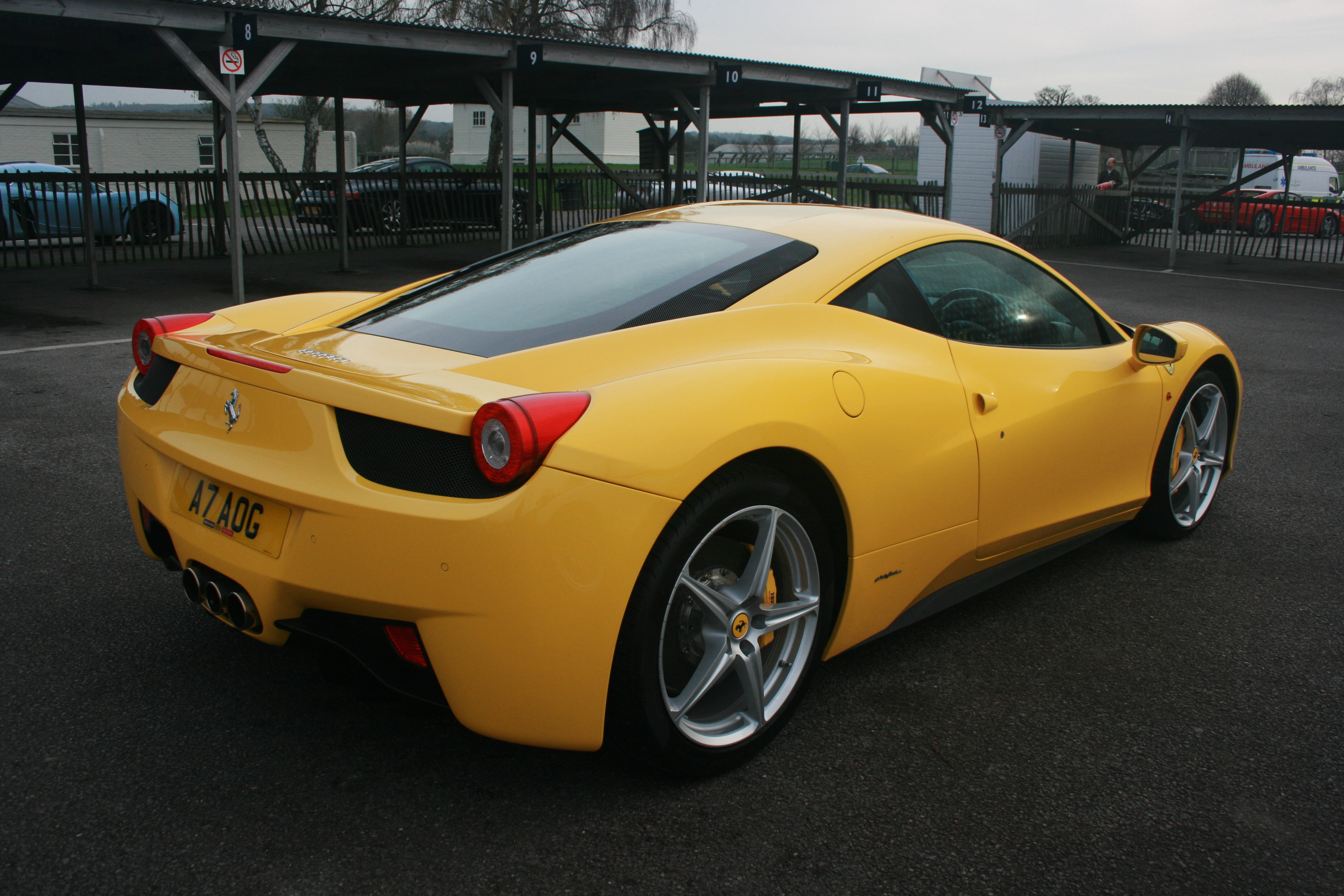 Ferrari 458 Italia